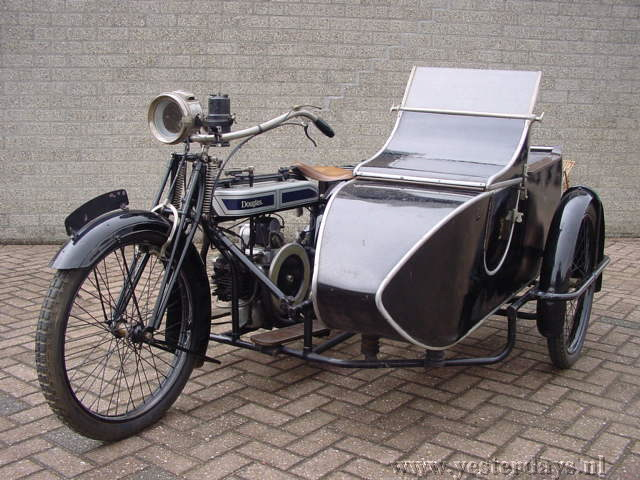 Toestemming van Yesterdays Antique Motorcycles